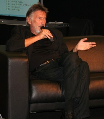 Christian Brückner während einer Podiumsdiskussion auf der Frankfurter Buchmesse 2006